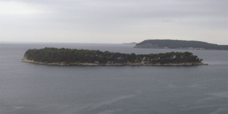 Island of Daksa, Koločep (back), sv. Andrija (far back), view from Lozica, near Dubrovnik, Croatia